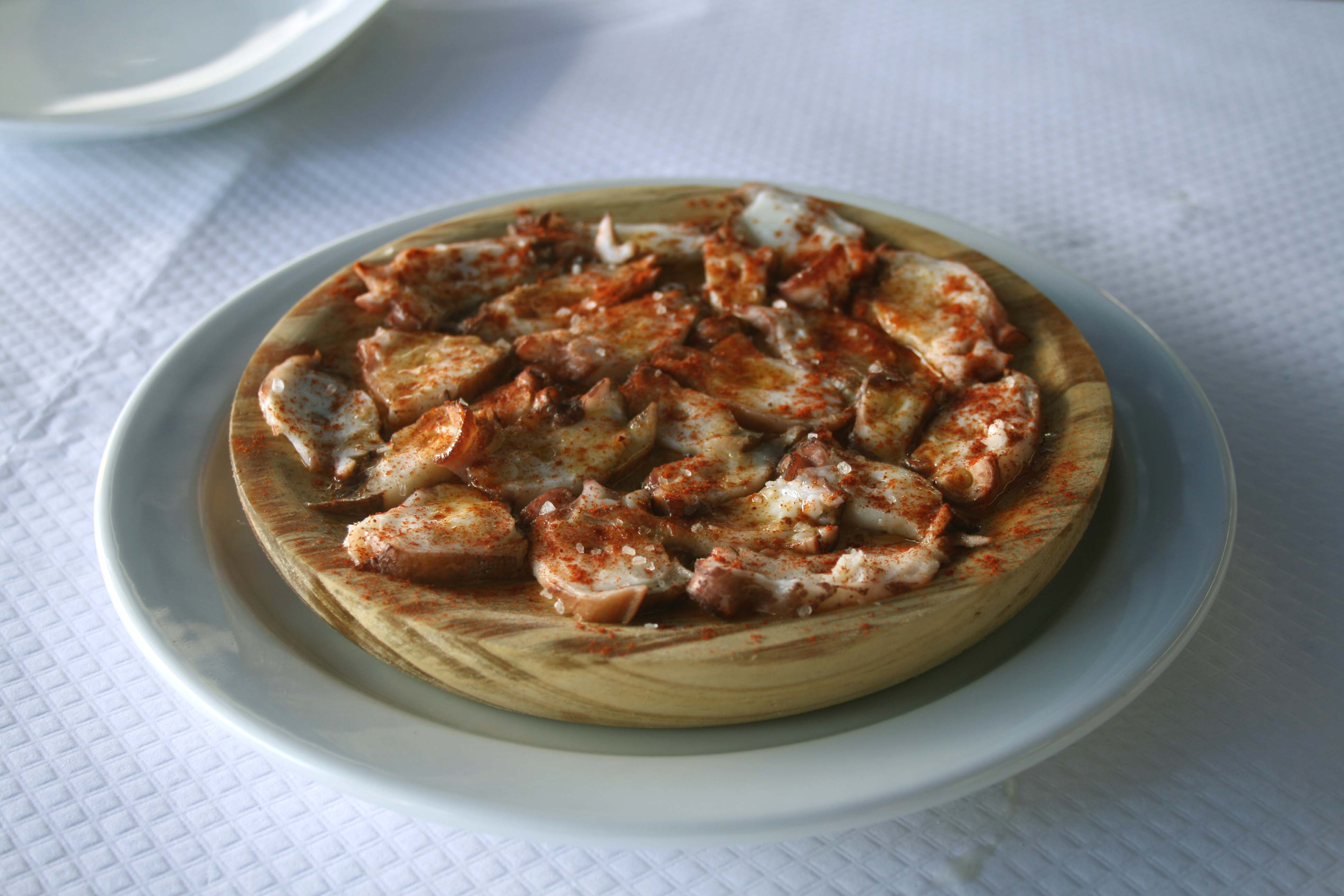 Ración de pulpo - Delta de Ebro